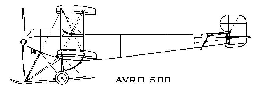 Avro 500 Drawing - left side